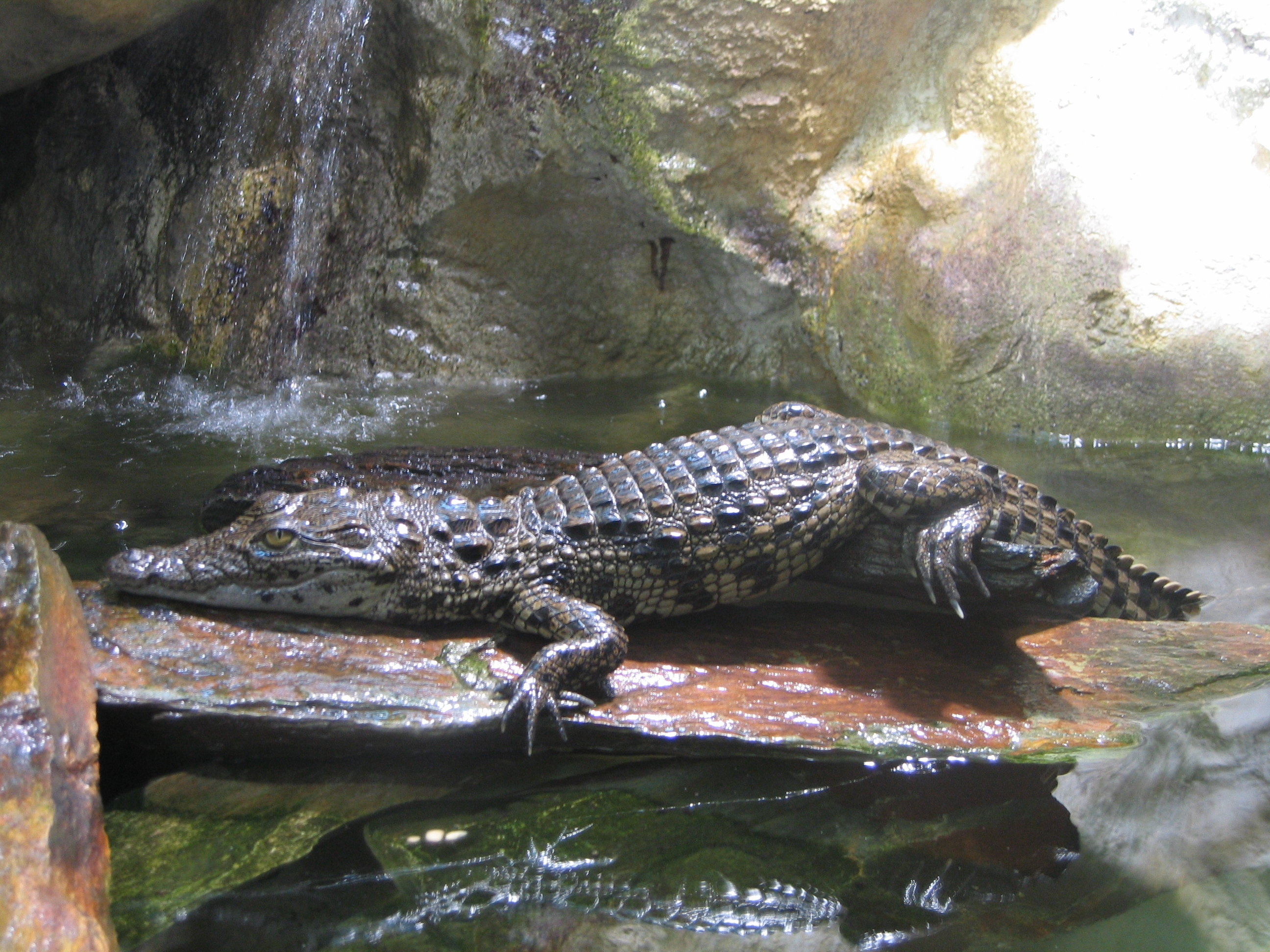 Jeune crocodile du Nil à l'aquarium de la porte dorée à Paris